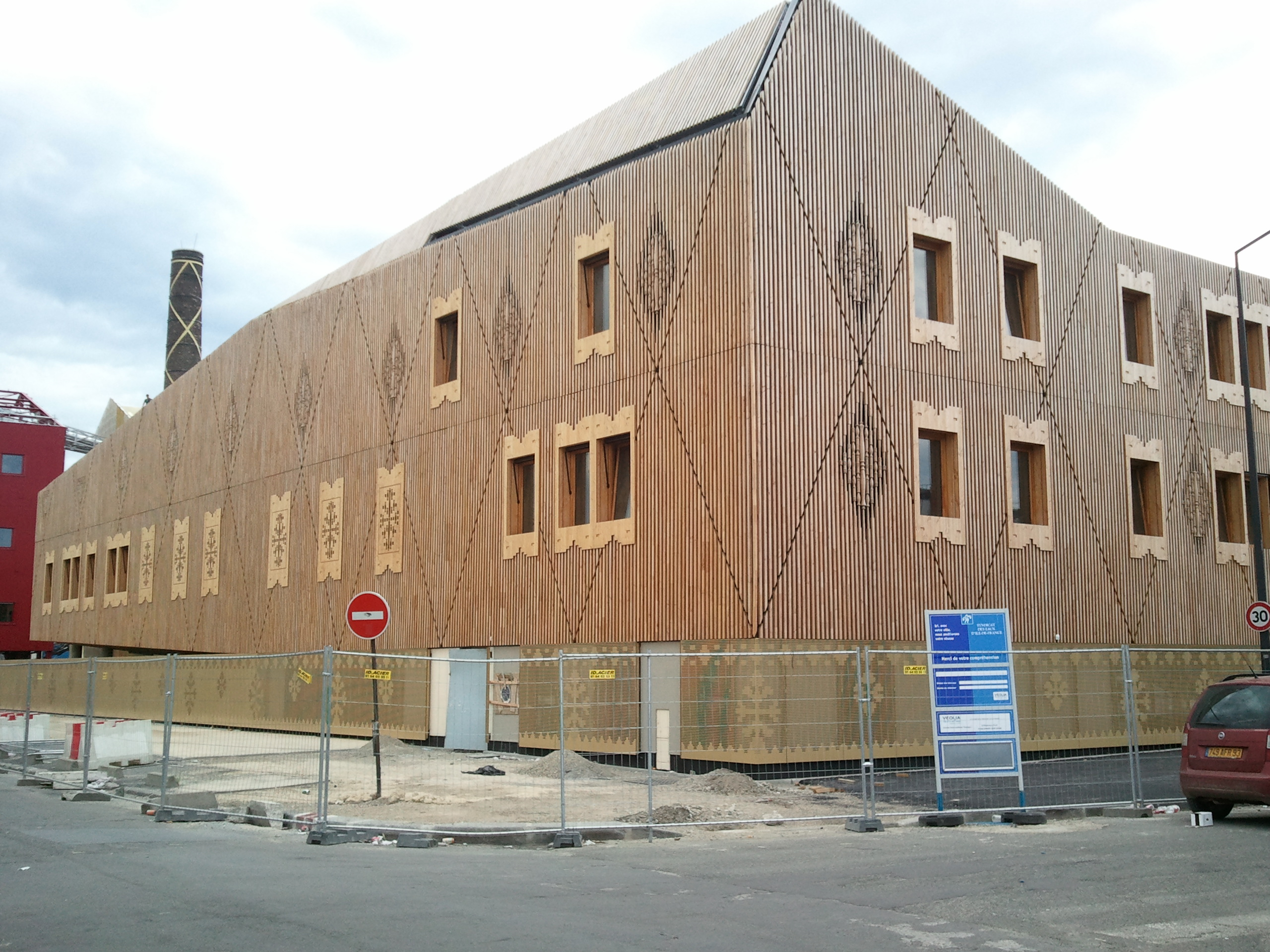 La Plaine Saint-Denis : Achèvement du chantier de construction du groupe scolaire intercommunal entre Saint-Denis et Aubervilliers